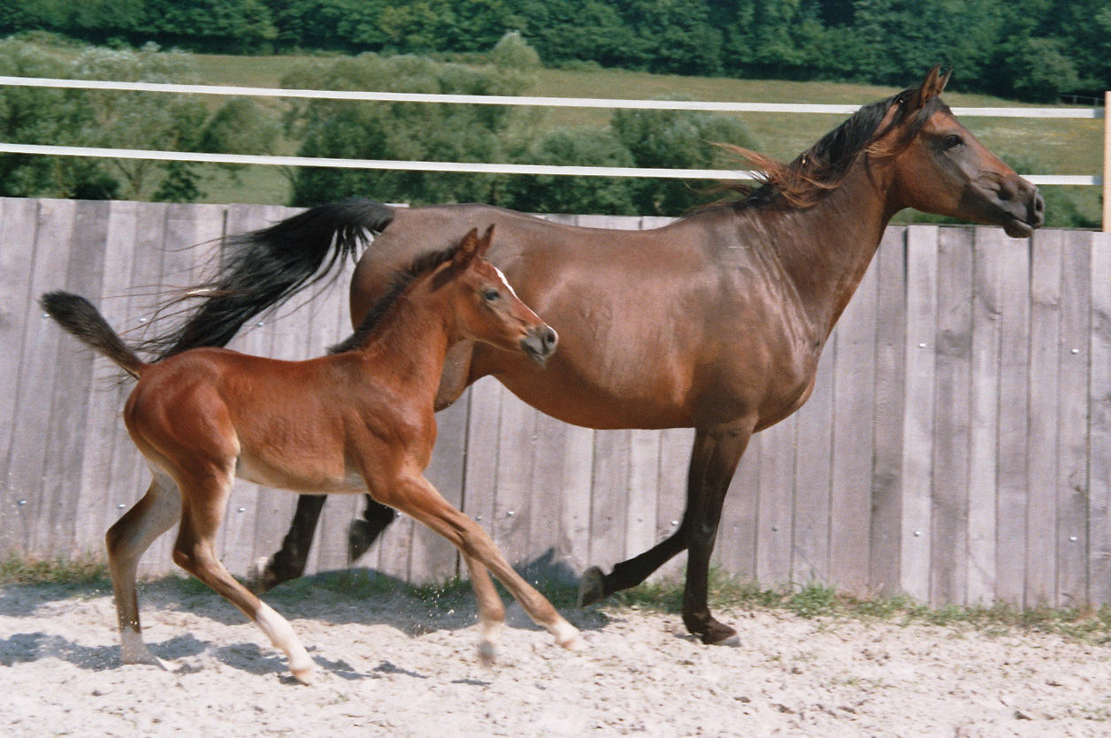 Poulinière shagya suitée